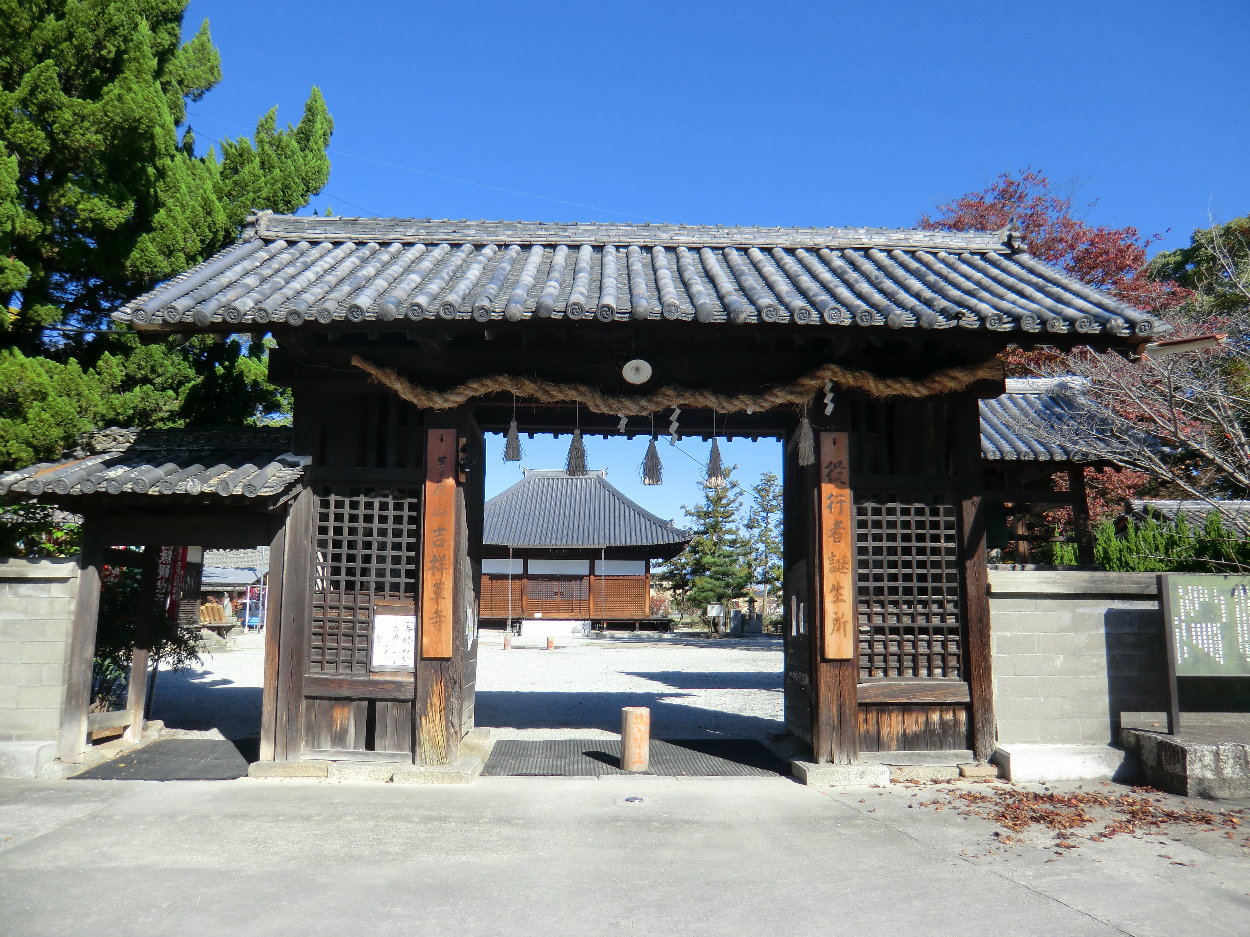 吉祥草寺 山門